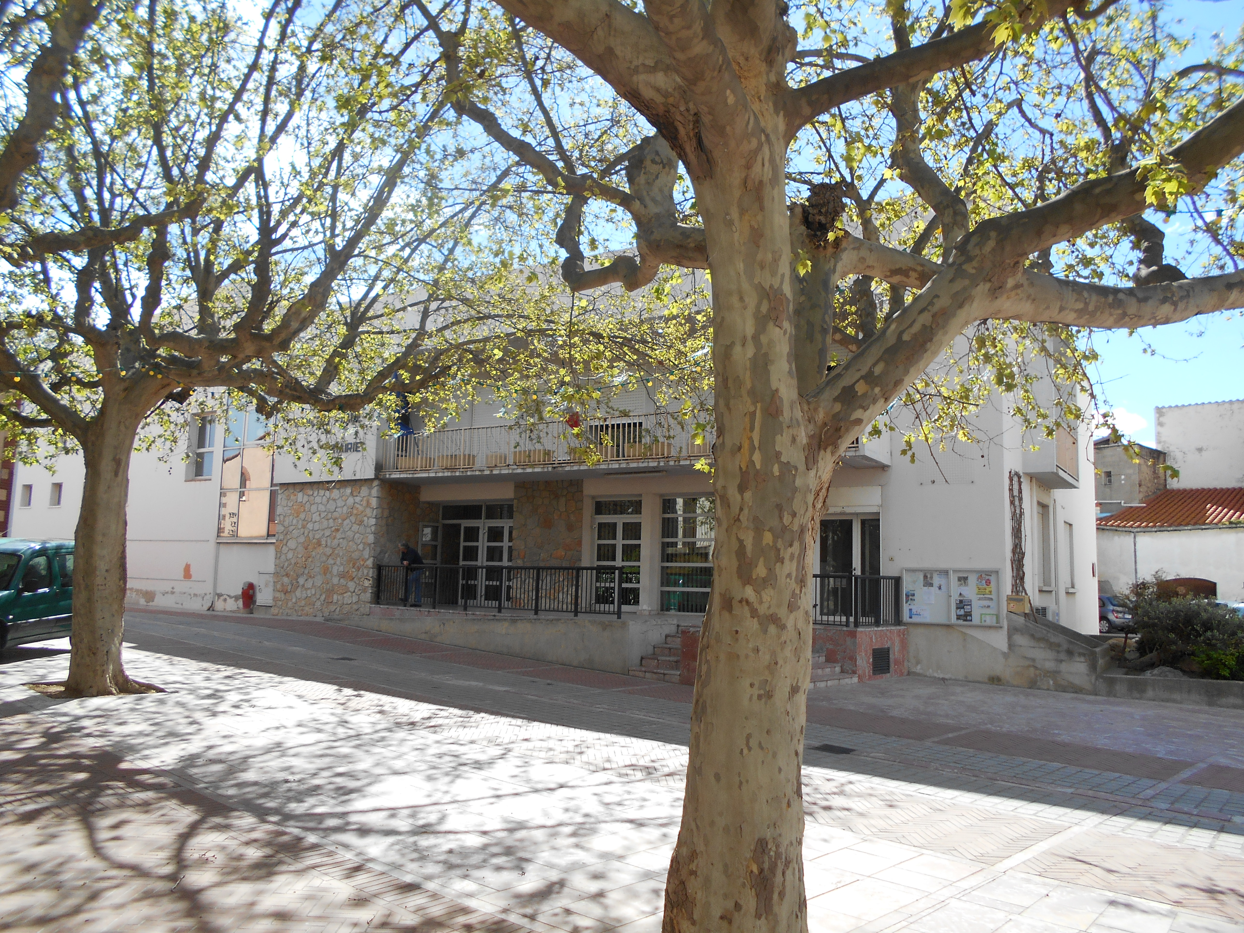 La Casa del Comú de Palau del Vidre